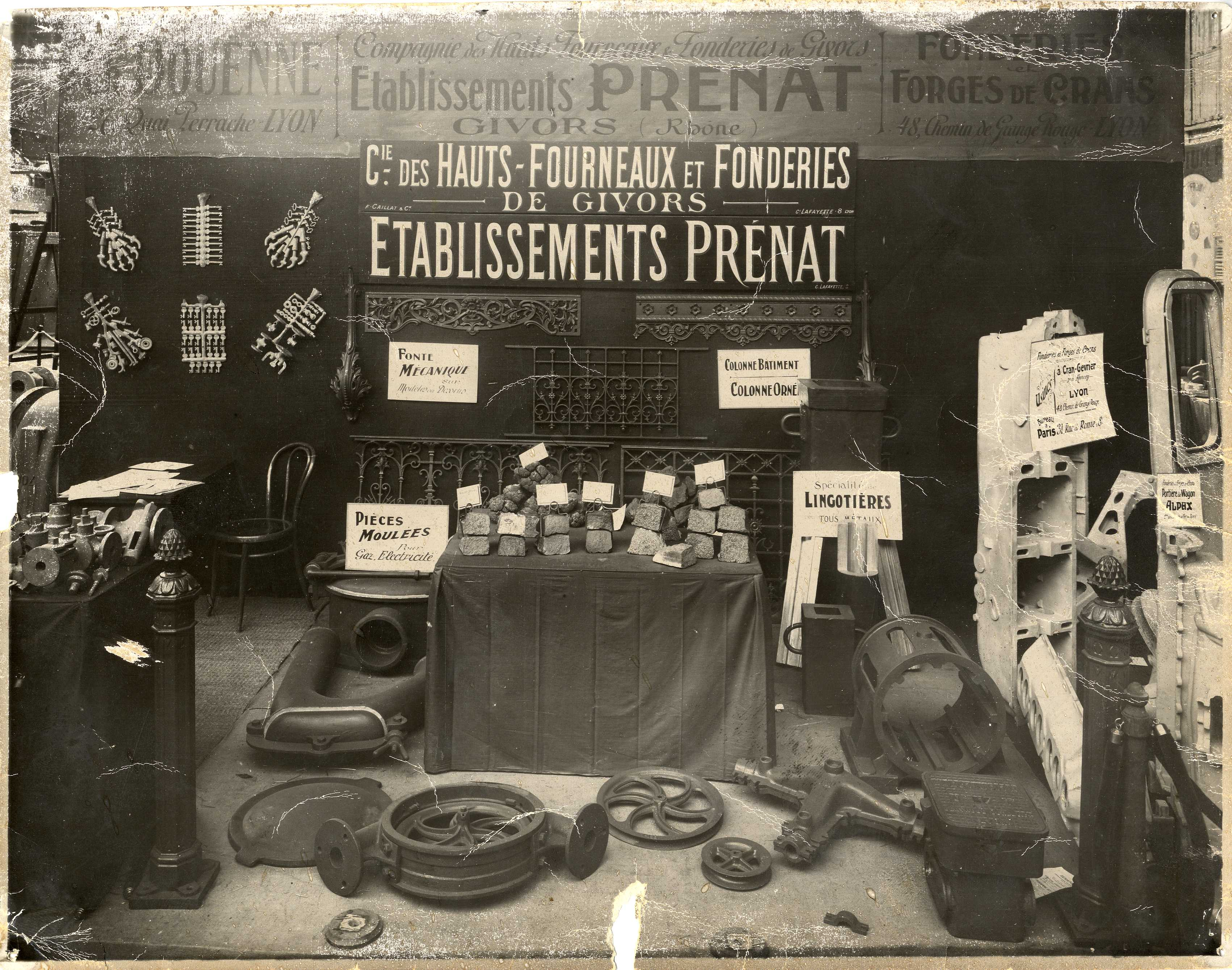 Etablissements Prénat. Exposition des produits manufacturés. Env. 1910, Archives municipales de Givors, cote 5Fi 1895 2